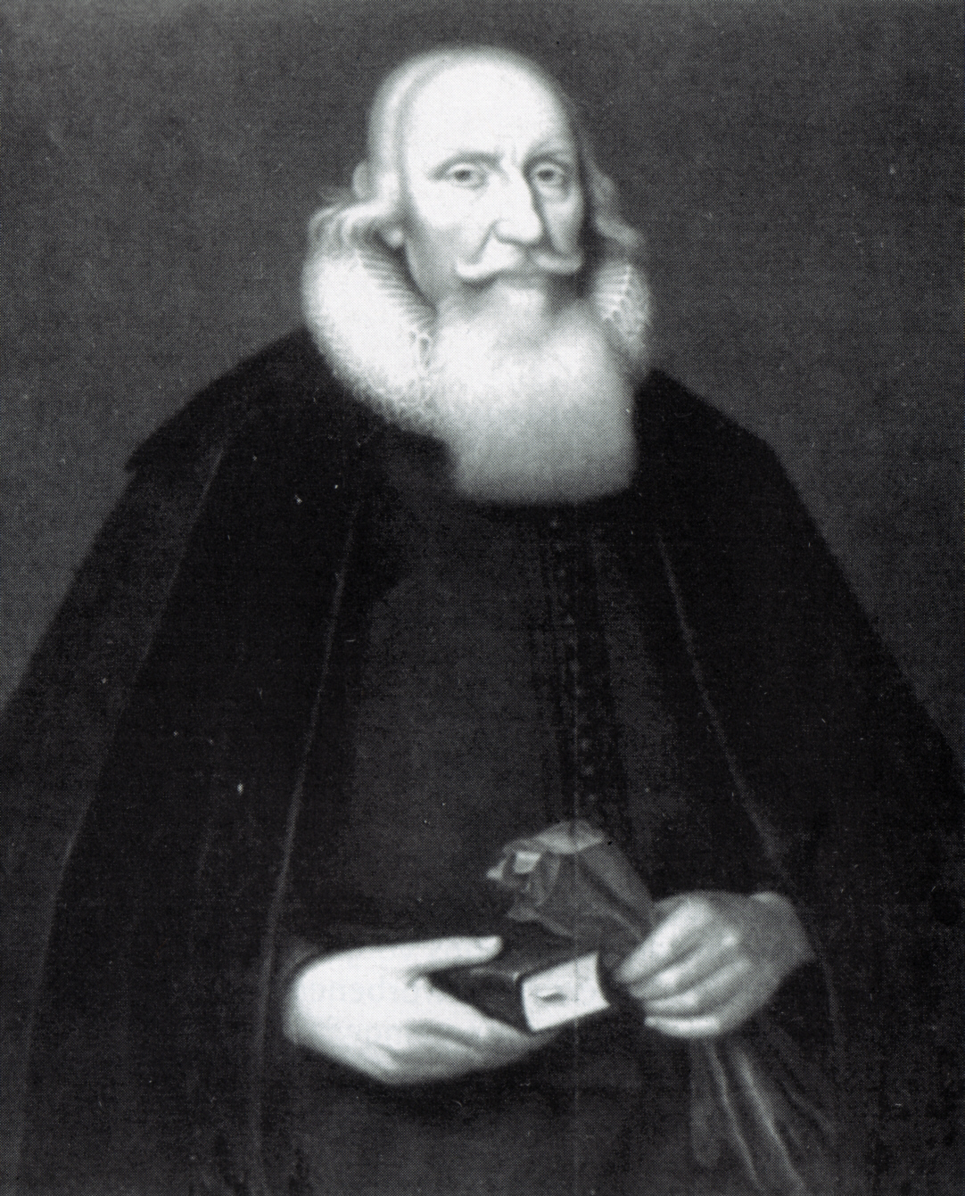 Sebastian Meier (1594-1664), deutscher Pädagoge. Gedenkbildnis im Lübecker Dom.